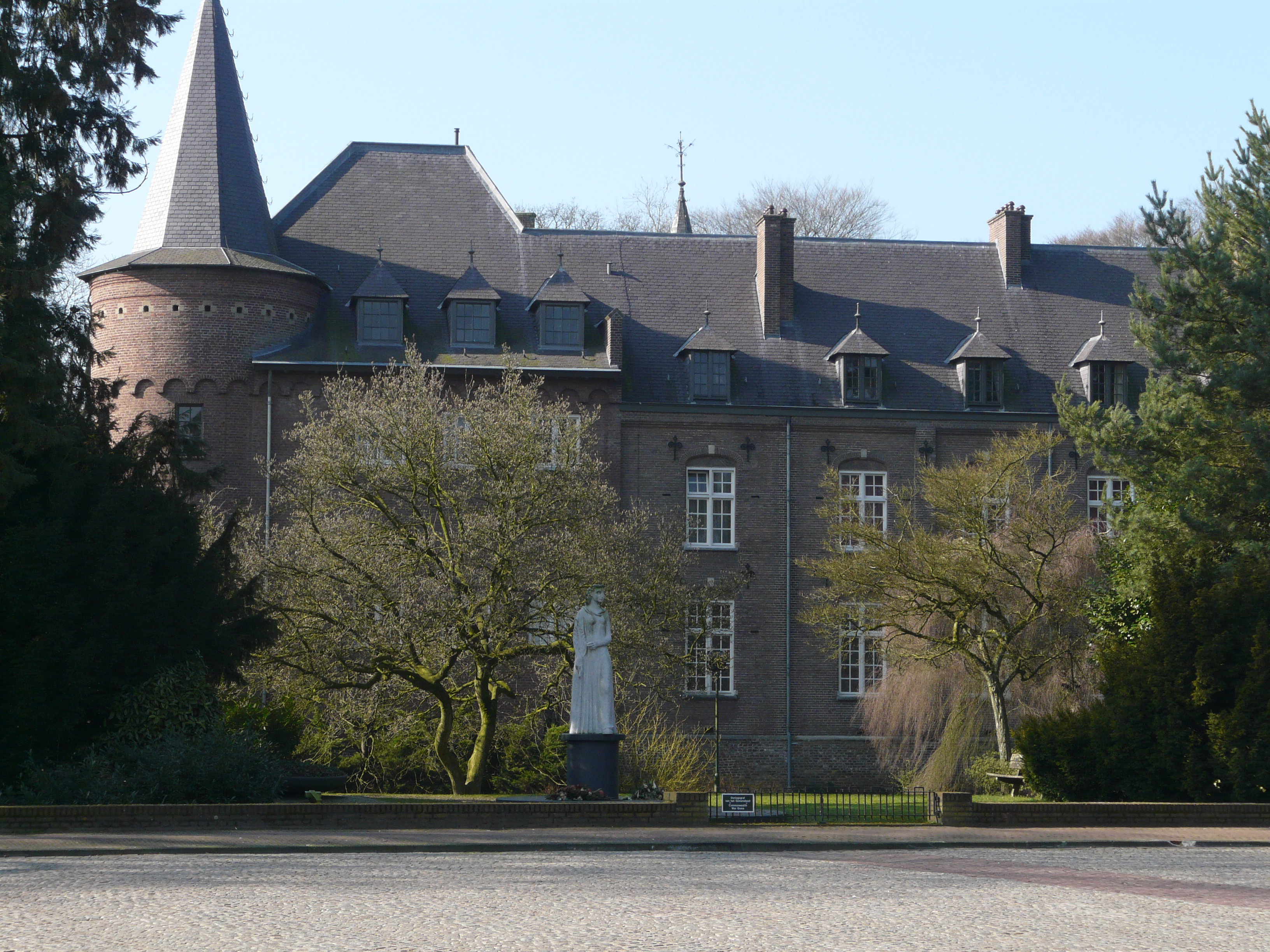 Kasteel van Gemert 32″ N, 5° 40′ 52.04″ E